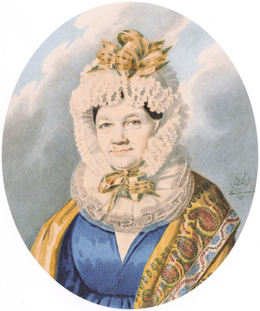 Княгиня Наталья Федоровна Горчакова, ур. Боборыкина (ум. 1833)